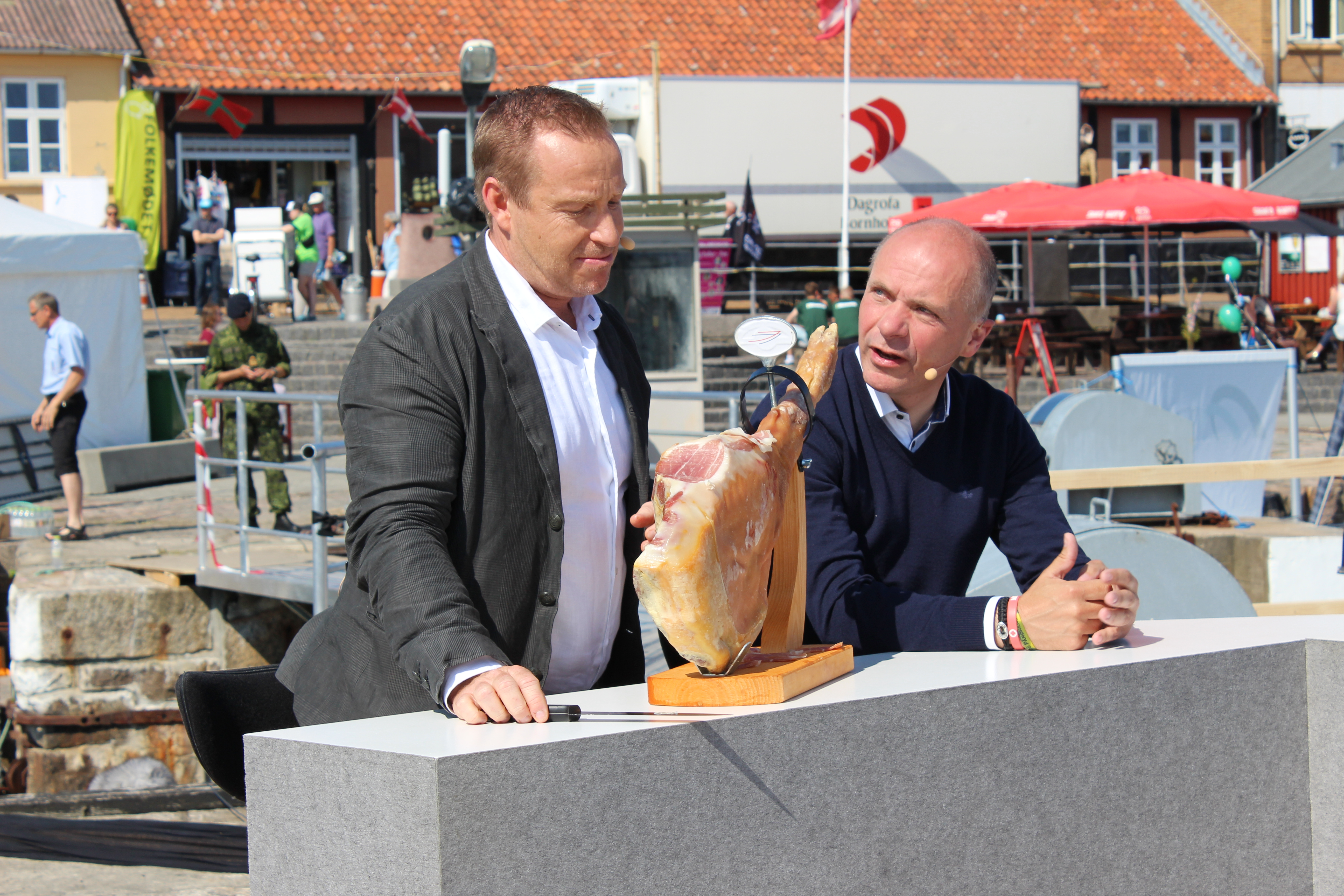 Photo credit: DR's Kulturarvsprojekt Følg DR's aktiviteter på Folkemødet på og Se DR2 Morgen Besøg DR2 Morgen